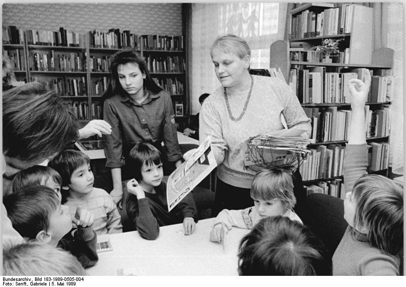 Schwerin, Schulbibliothek ADN-ZB Senft 5.5.89 Schwerin: Otto-Grotewohl-Schule- Nachmittags treffen sich die Hortkinder der 1. Klasse manchmal in der schuleigenen Bibliothek. Heute geht es für die Kleinen darum, Märchenrätsel zu lösen und Puzzles zu legen. Bibliothek-Facharbeiterin Christa Bartels, die diese Zweigstelle zweimal in der Woche betreut, teilt nach dem Spiel die "Preise" aus. Jana Toppe (l.), eine FDJlerin aus der Klasse 10a, unterstützt die Bibliothekarin an diesem Nachmittag. Die größte Schulbibliothek in Schwerin-Lankow besitzt 5.000 Bände und 300 Schallplatten. Sie ist in der Otto-Grotewohl-Schule untergebracht, steht aber auch den Schülern anderer POS offen. (siehe 5 und 6 N)